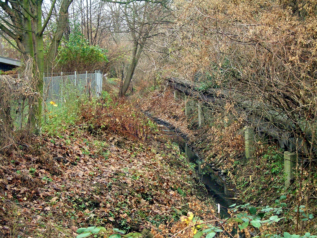 Wendenmühlengraben in Braunschweig nahe der Neuen Knochenhauerstraße als offenes Gerinne, 2009.